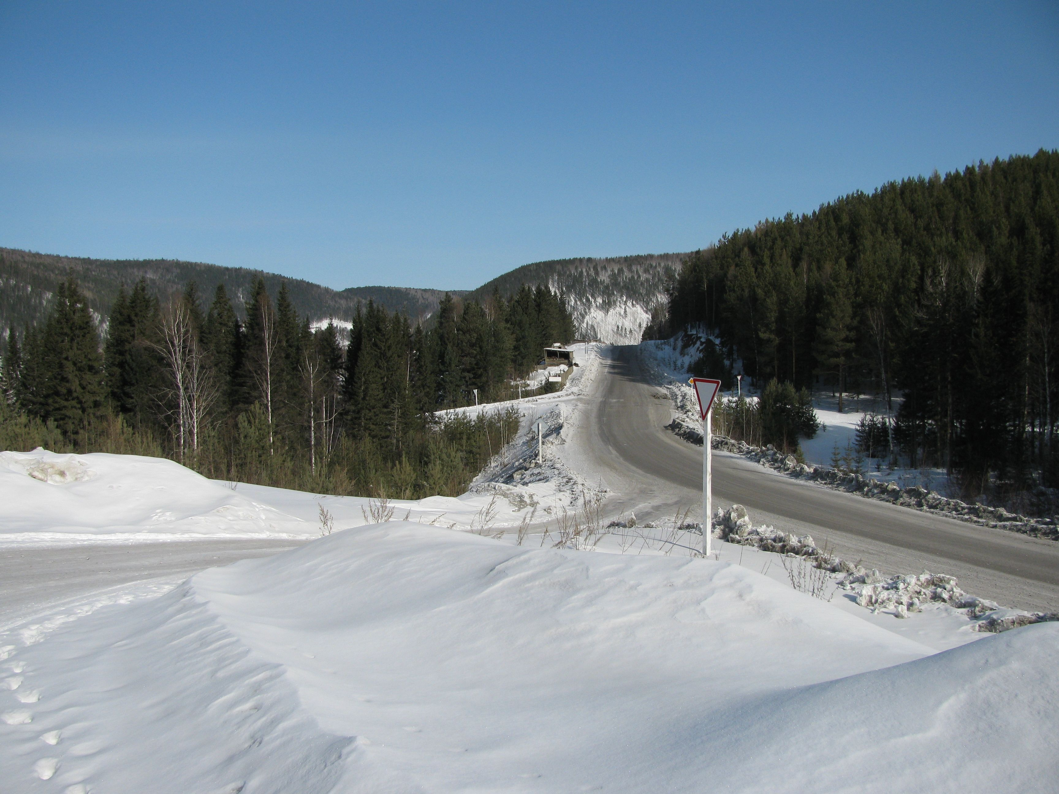 Всё, поехали в Эвенкию.